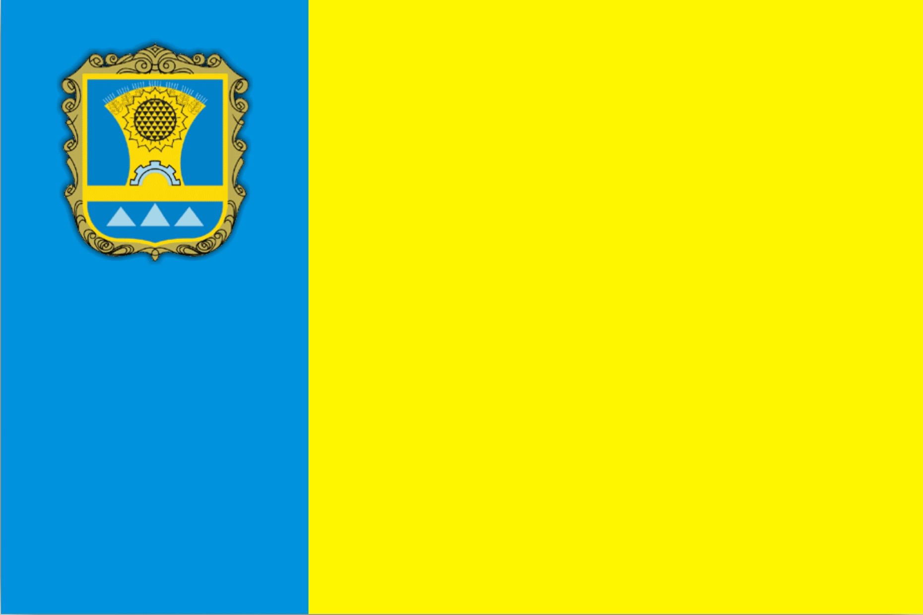 Прапор Вільнянського району